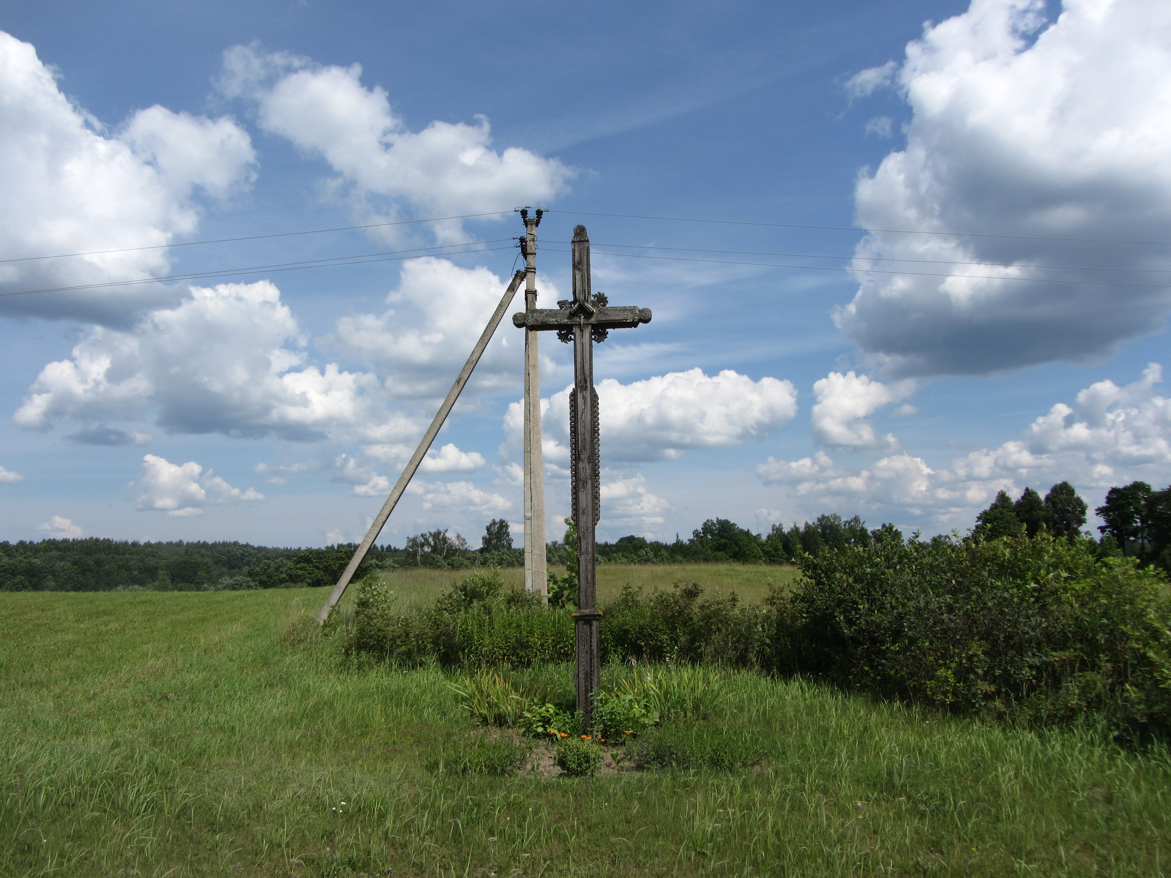 Degučių sen., Lithuania